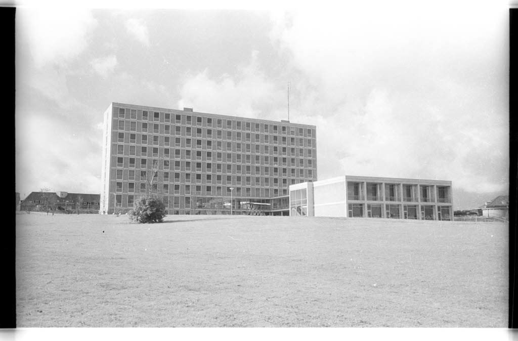 Blick vom Hindenburgufer.